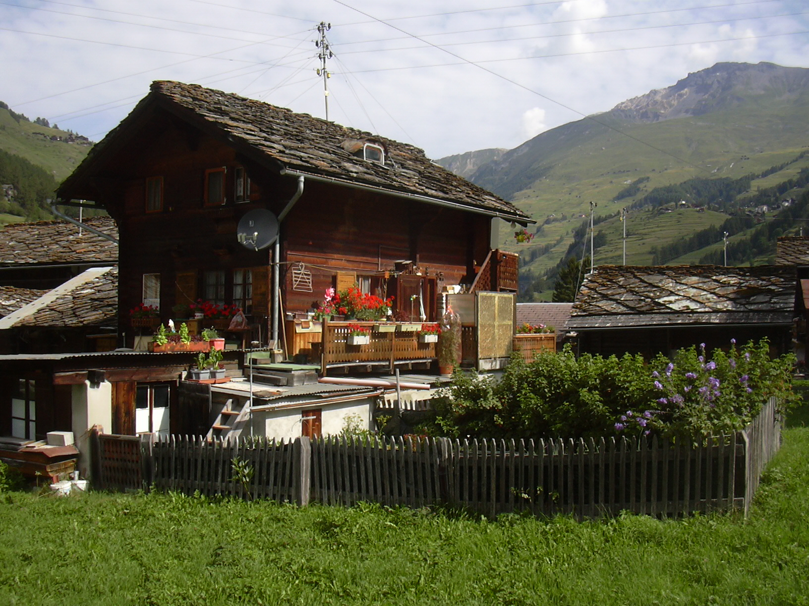 Typical wooden hut (chalet style) in Les Haudères, Val d'Hérens, Valais/Switzerland